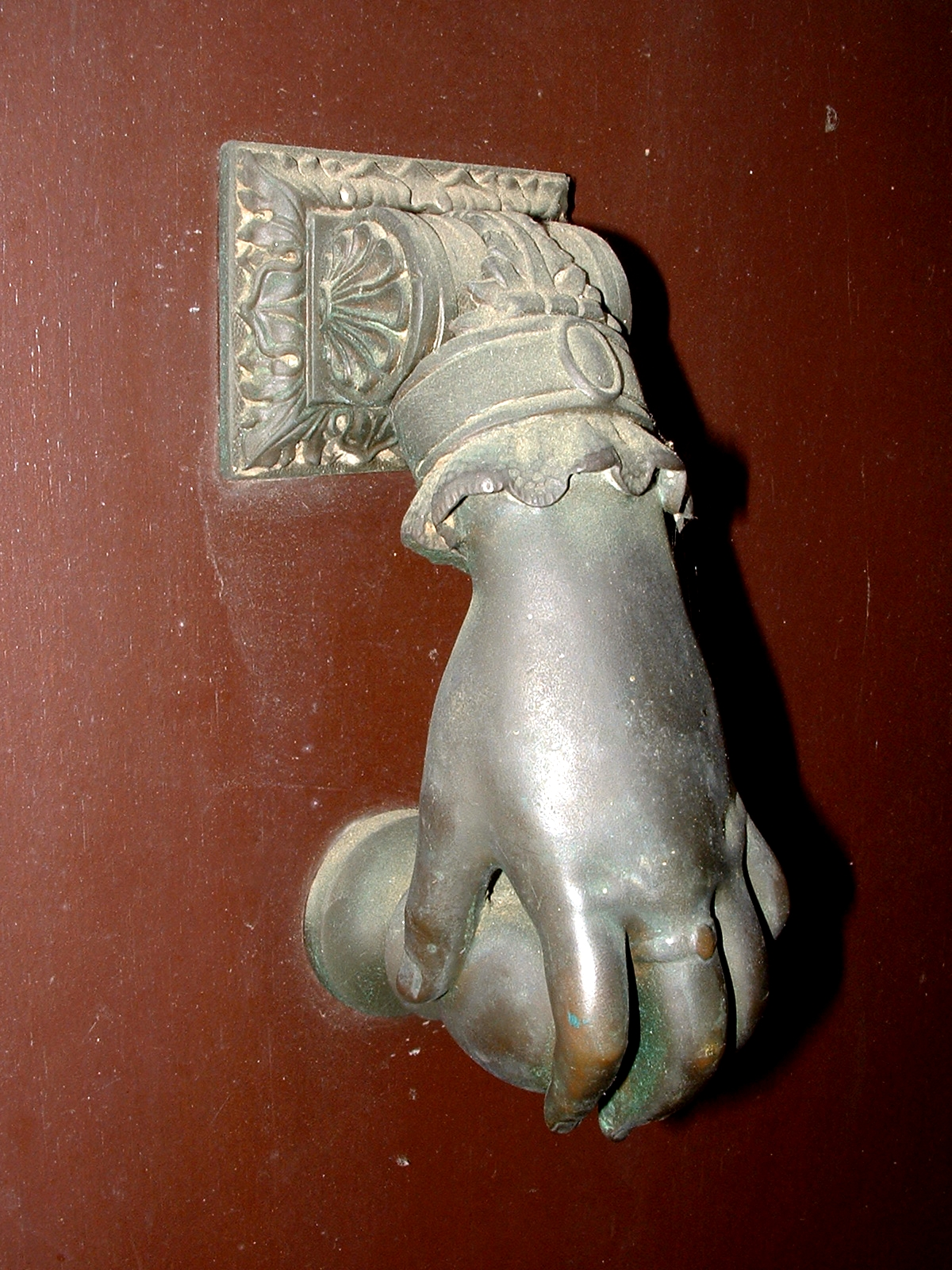 Bort-les-Orgues, Corrèze 2007.